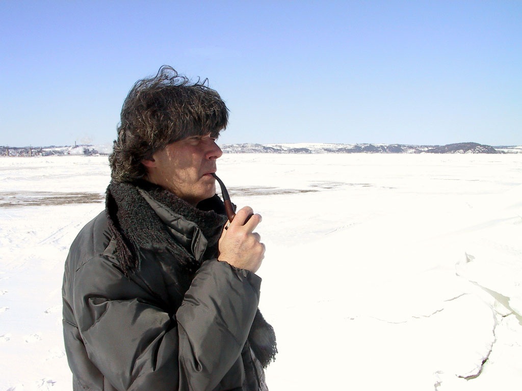 Portrait de l'artiste Martin Müller-Reinhart, à La Baie, sur les glaces du Saguenay, en 2003.